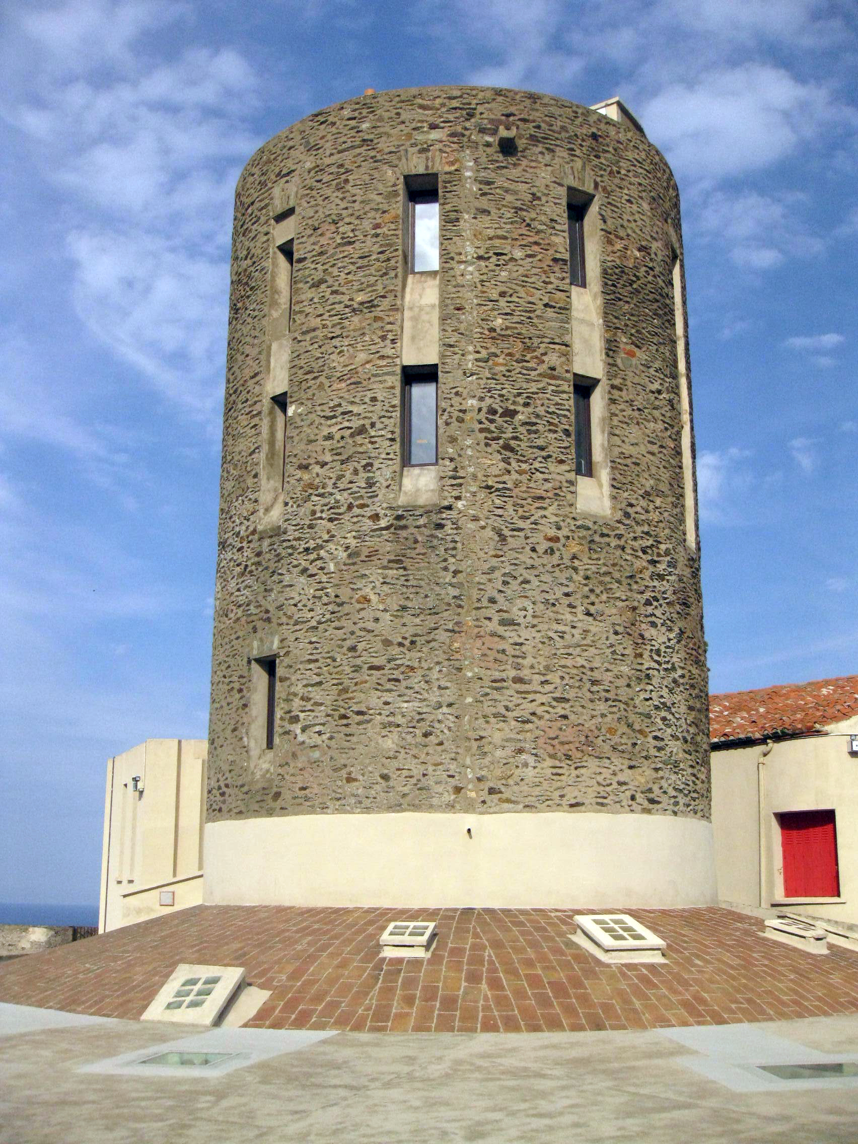 Fort de Sant Elm (Cotlliure)